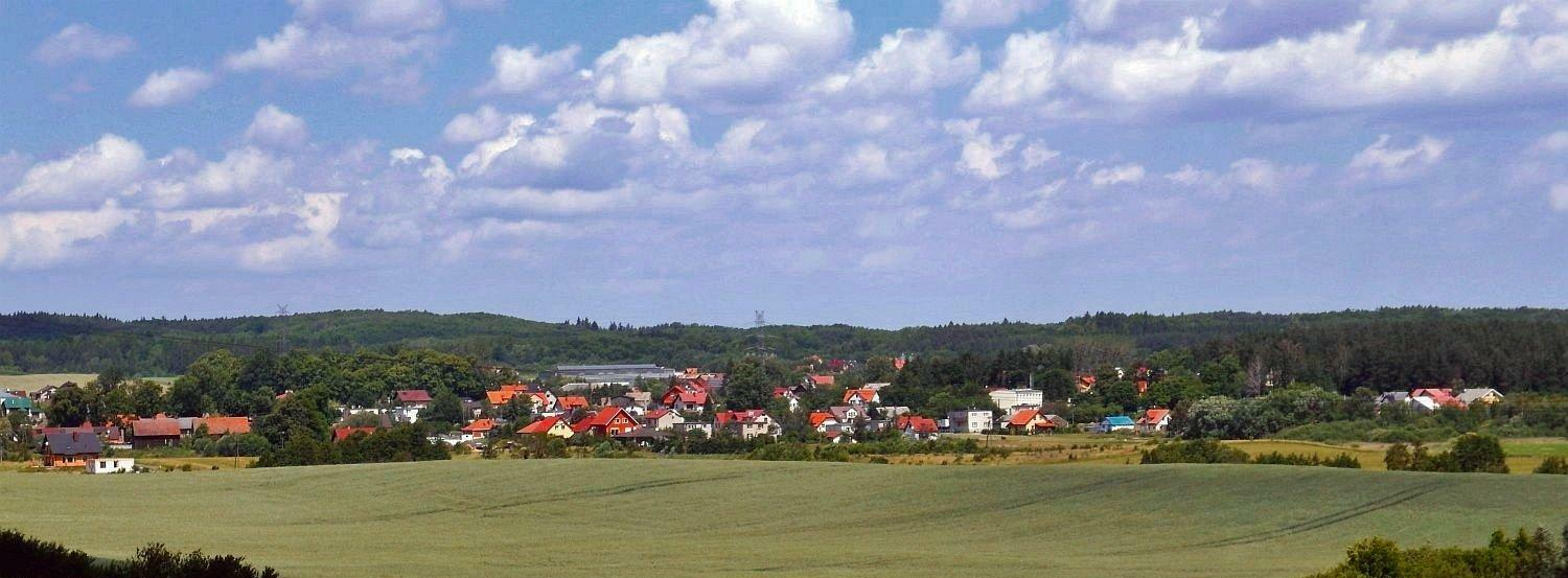 Panorama Lublewa, widziana z zamku wodnego na zbiorniku Kobudy II.